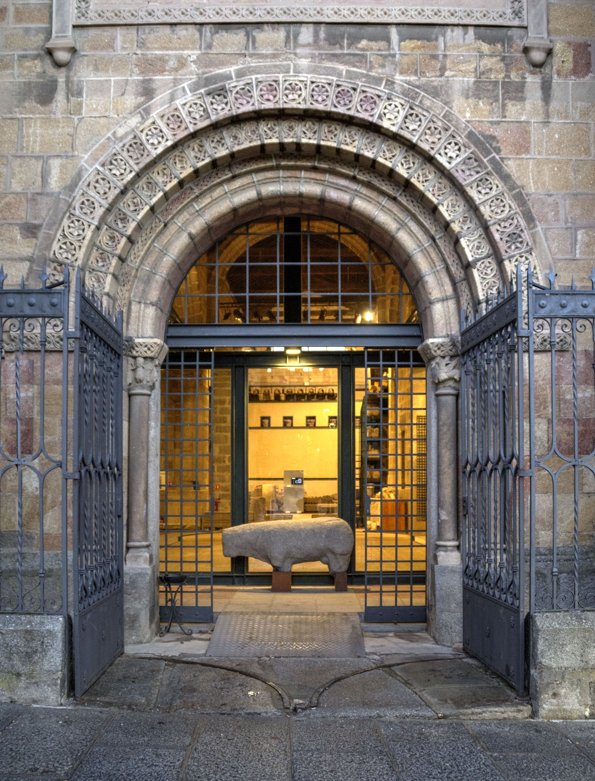 Iglesia fuera del recinto amurallado de Ávila, construida a mediados del siglo XII. Se usa para exponer piezas del museo arqueológico. La portada es románica. El toro o verraco que se muestra en la puerta es prerromano y fue encontrado en las excavaciones arqueológicas del cementerio musulmán de la ciudad.